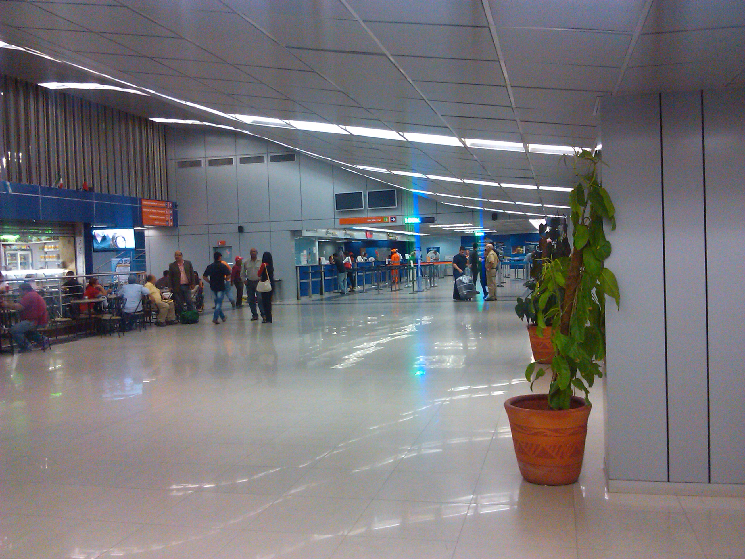 Interior del Aeropuerto Jose Tadeo Monagas, en Maturín, Monagas, Venezuela.